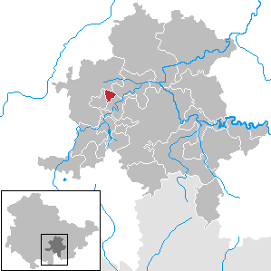 Bechstedt in Thuringia - District Saalfeld-Rudolstadt